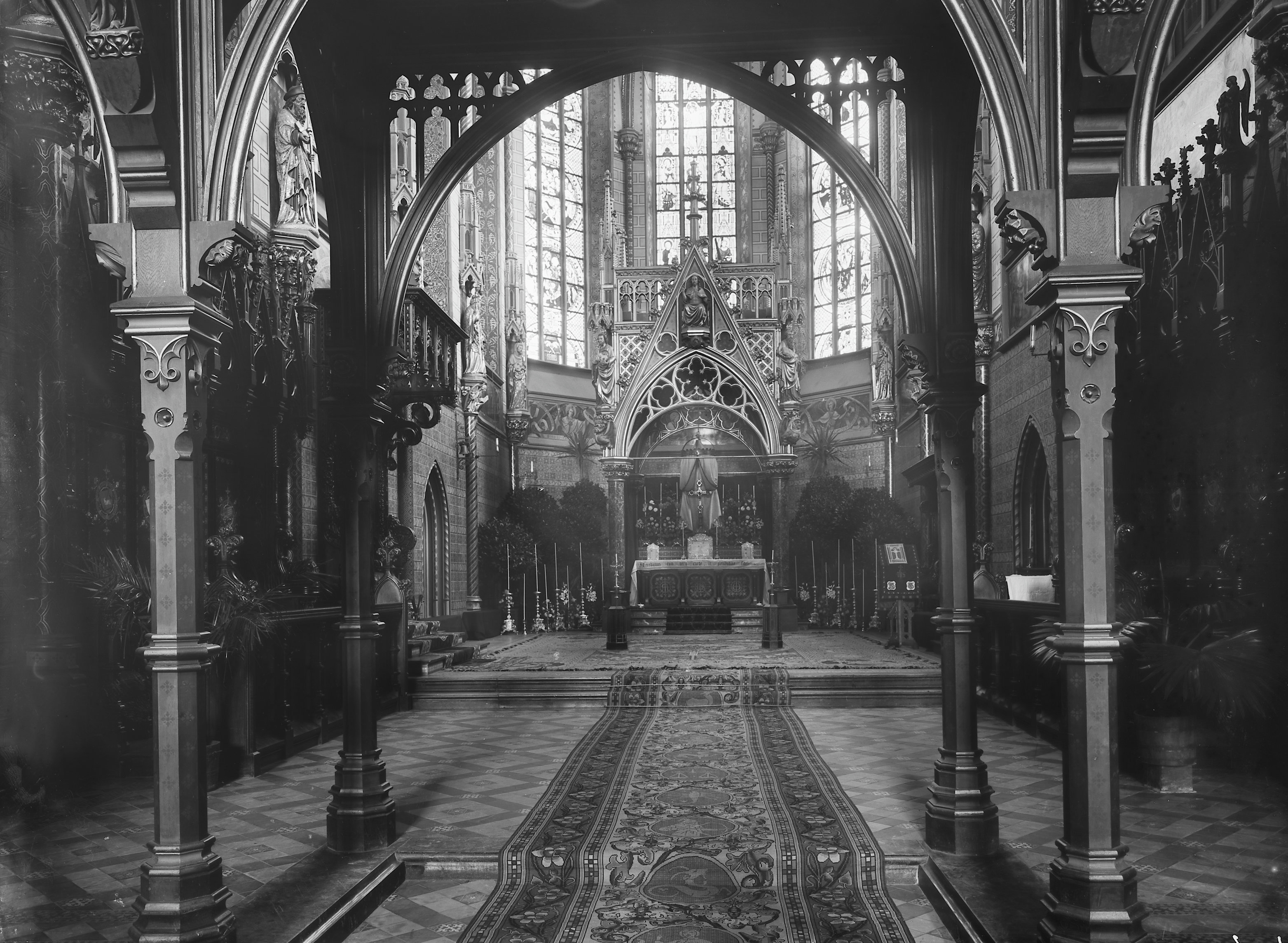 Catharijne Kerk: gezien in het koor